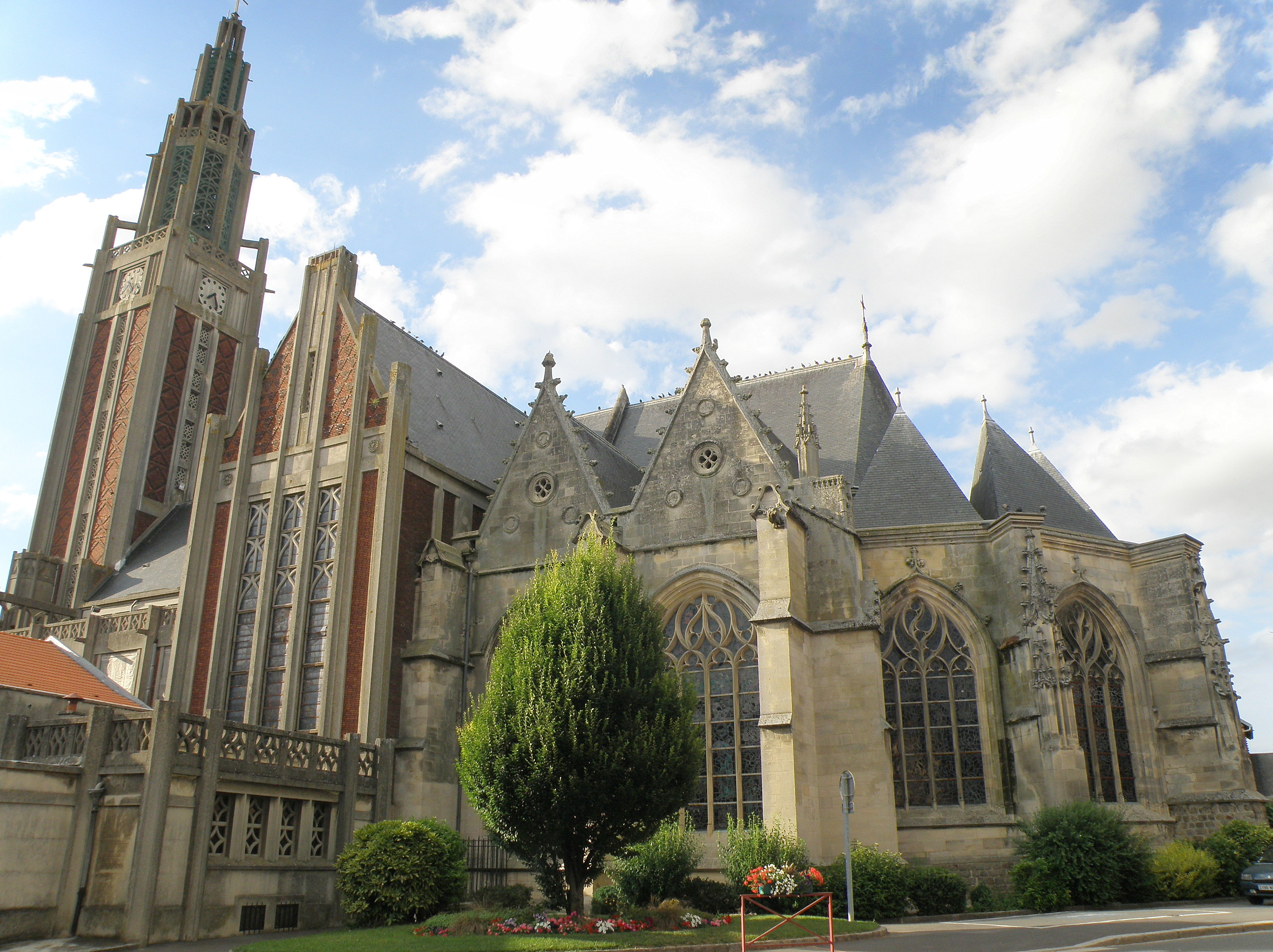 Roye, comm. de la Somme, France (région Picardie). Eglise Saint-Pierre, reconstruite en béton, à l'exception du choeur, après sa destruction lors de la Première Guerre mondiale.